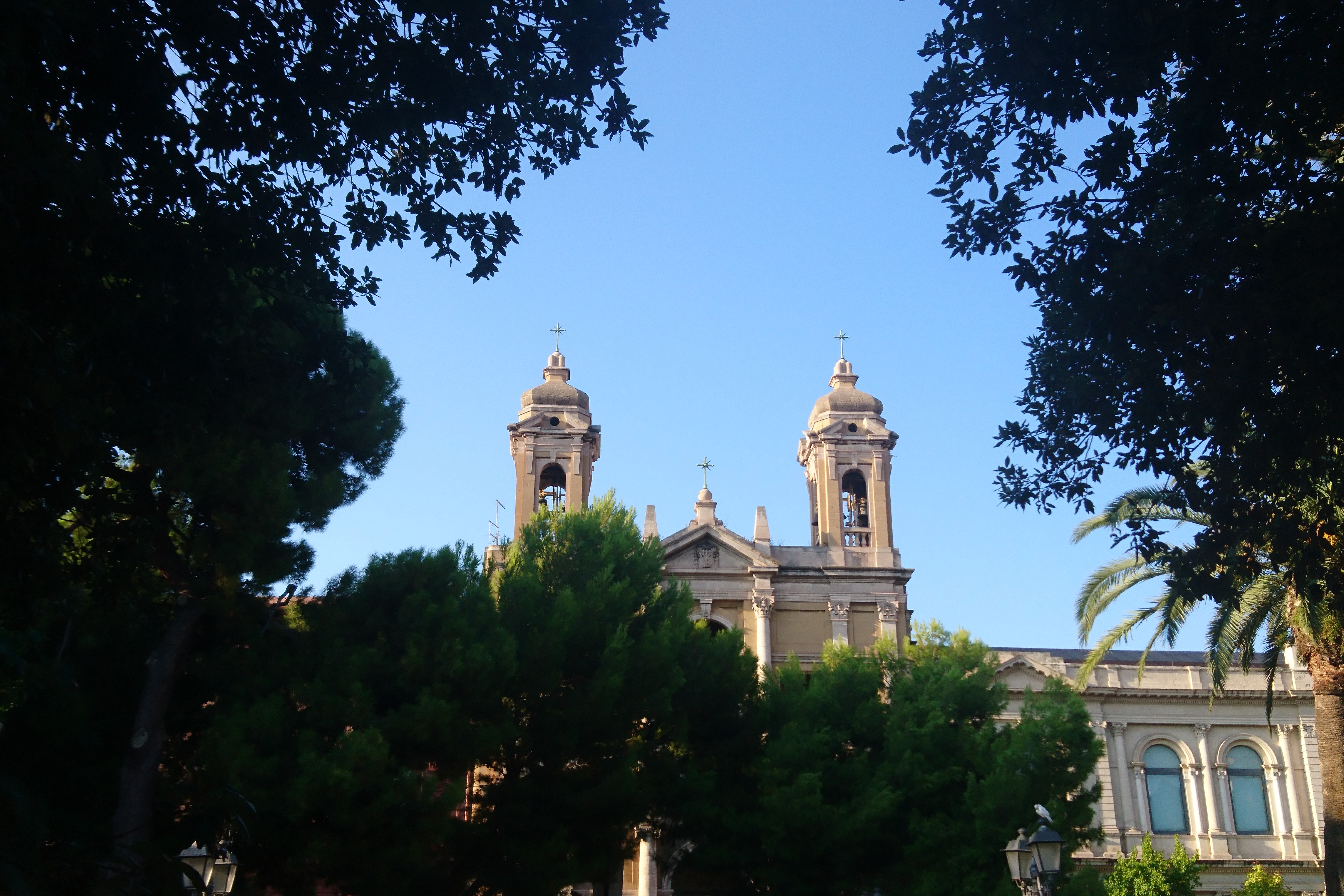 Chiesa di San Pasquale di Taranto